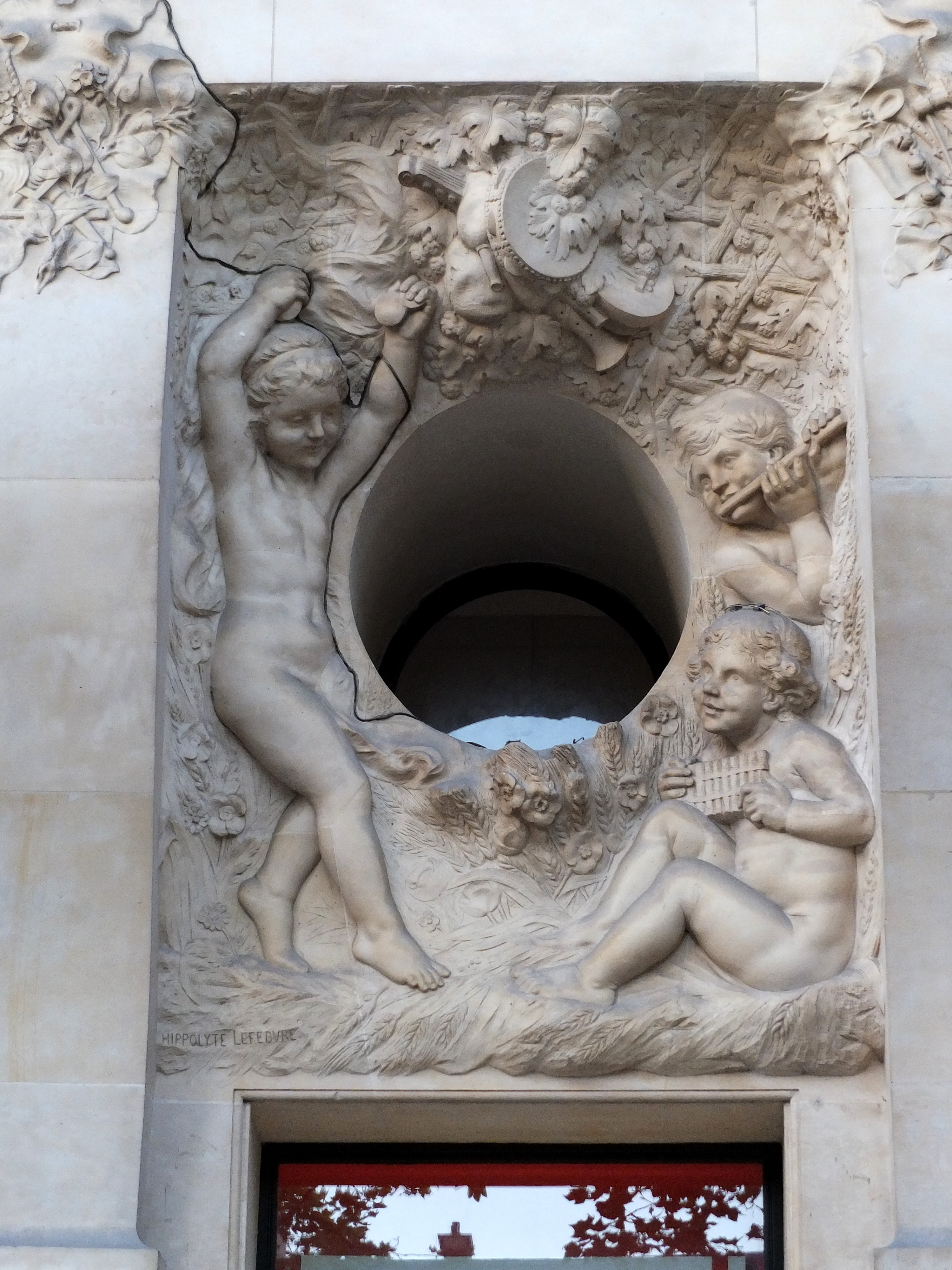 Décor sculpté par Hippolyte Lefèbvre (1863-1935) - Bâtiment de l'ancien hôtel Élysée-Palace au 103 avenue des Champs-Élysées (Paris, 8e arrond). Architecte Georges Chedanne (1861-1940).